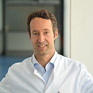 Prof. Dr. Maximilian Schmeding